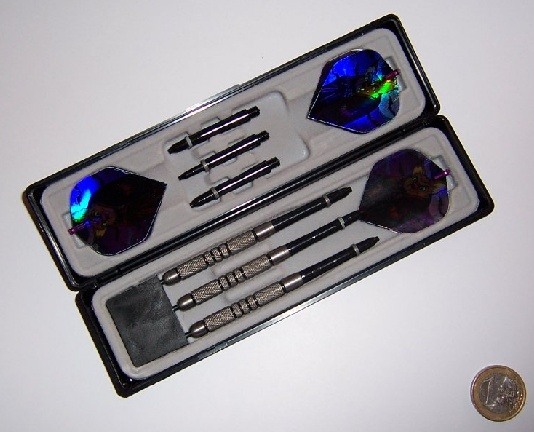 Photo de l'auteur Utilisateur:Blowgun